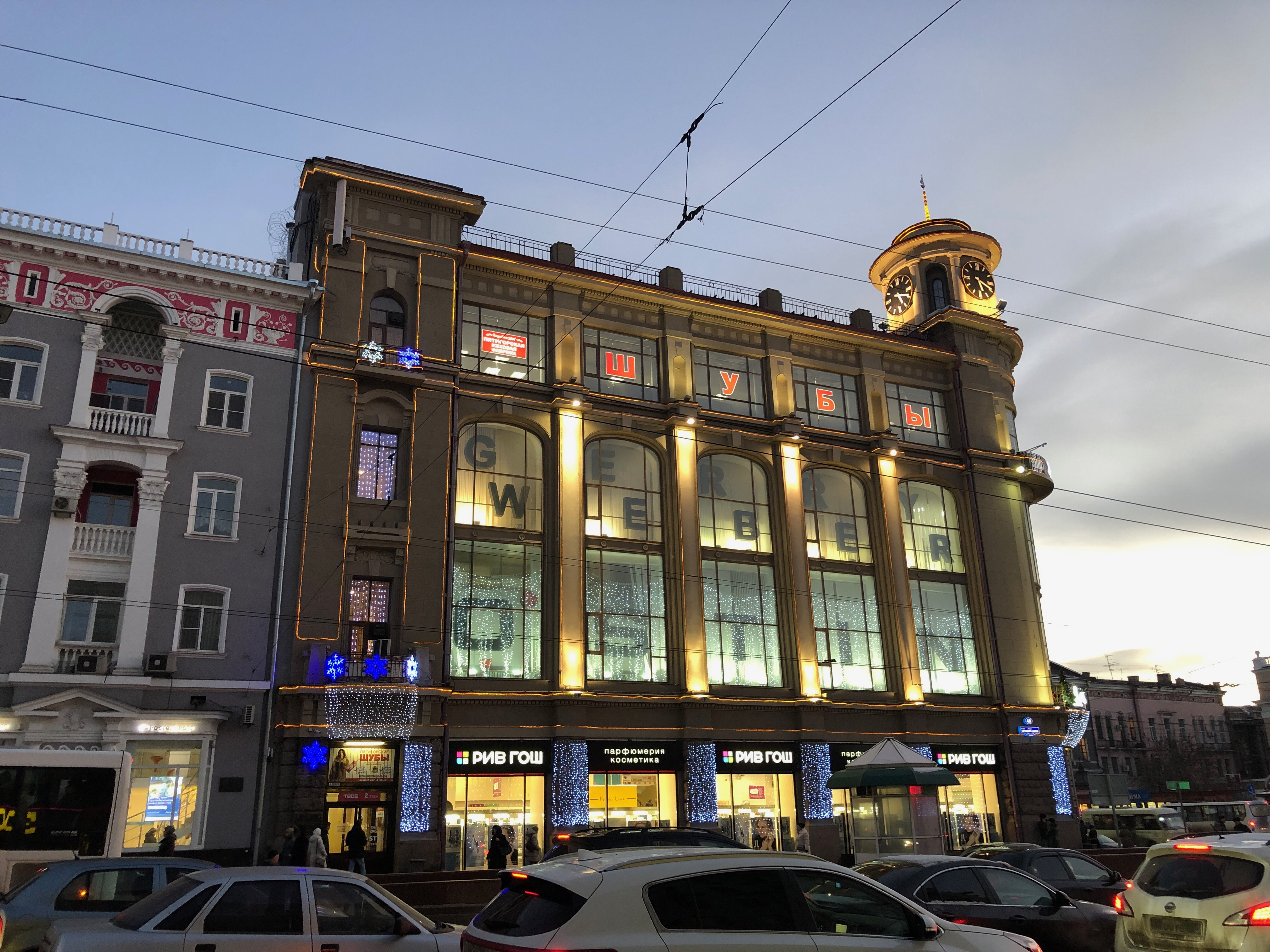 Ростов на Дону - Центральный универмаг